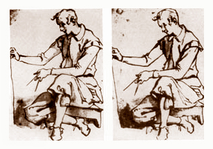 Rysunek ok. roku 1600 - źródło: Handbuch der Stereoskopie, Berlin-Leipzig 1927